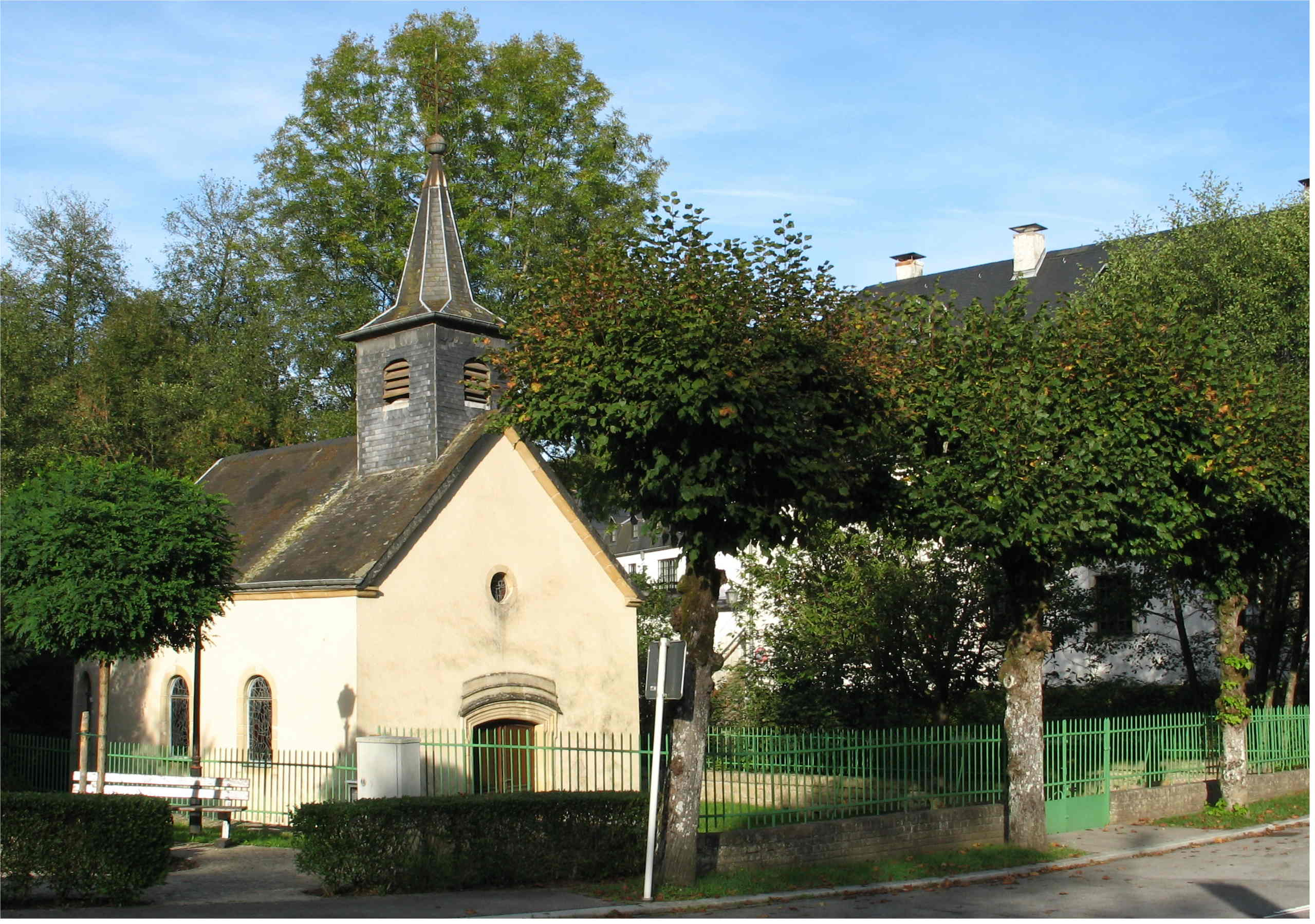 Bei der Kapell zu Dondel